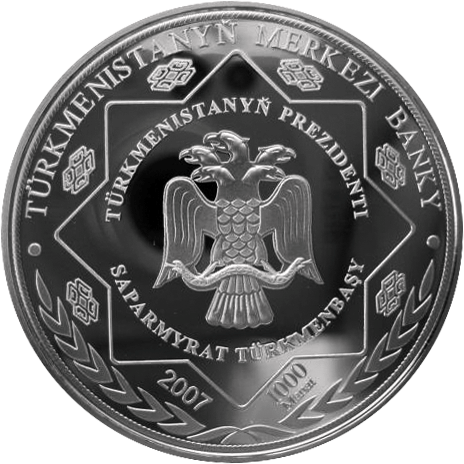 Памятная монета Туркменистана